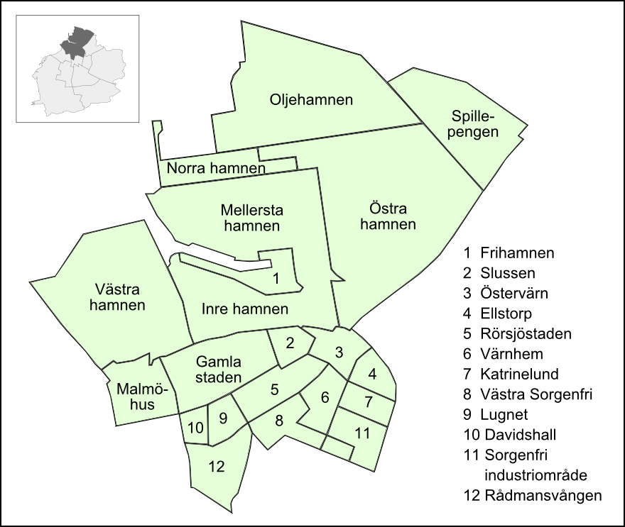 Delområden i Centrum, Malmö 2009